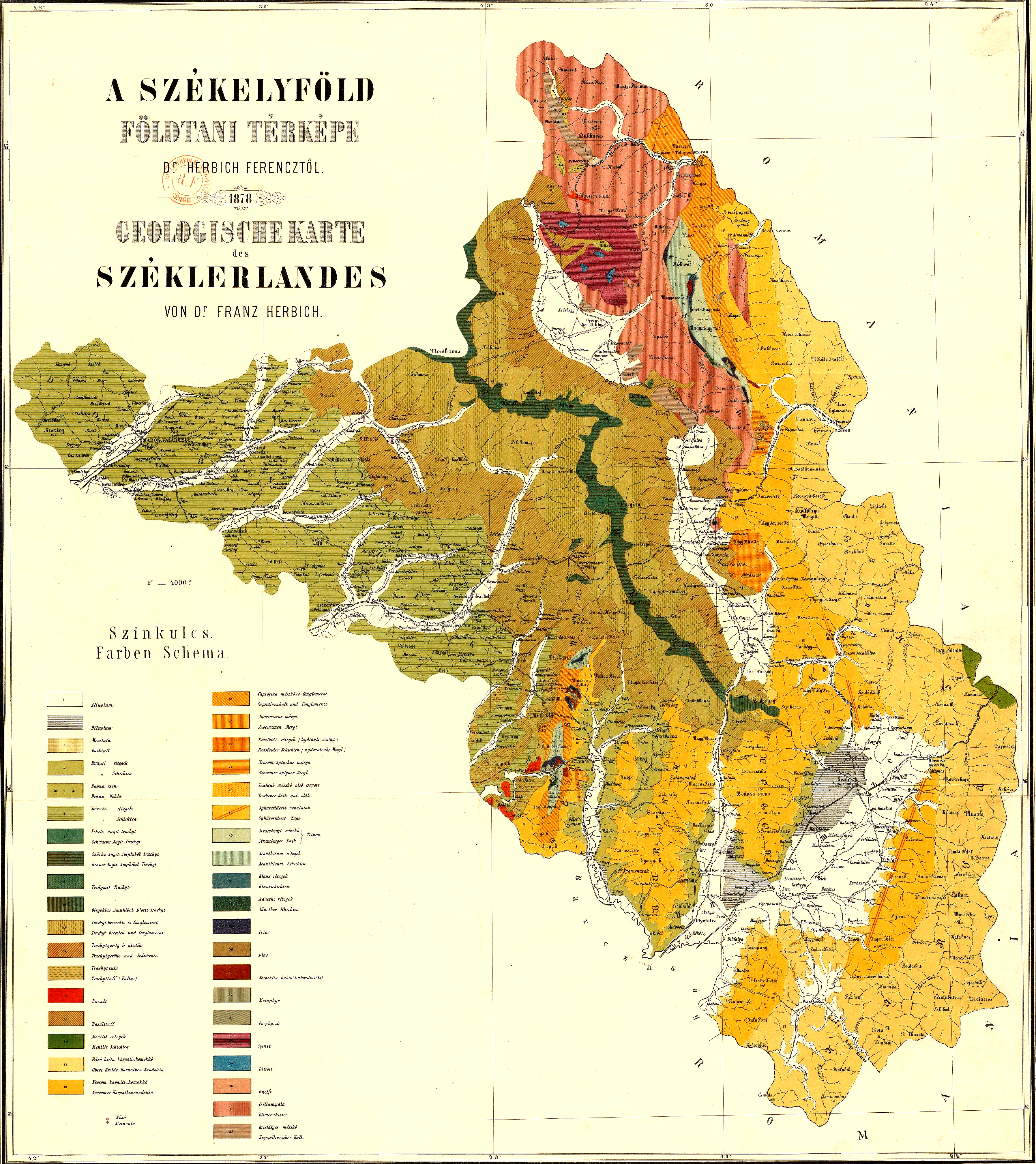 Székelyföld földtani térképe. Készítette Herbich Ferenc(Pozsony, 1821. január 15. – Kolozsvár, 1887. január 15.) bölcseleti doktor, geológus, az erdélyi múzeum őrsegéde, egyetemi magántanár.